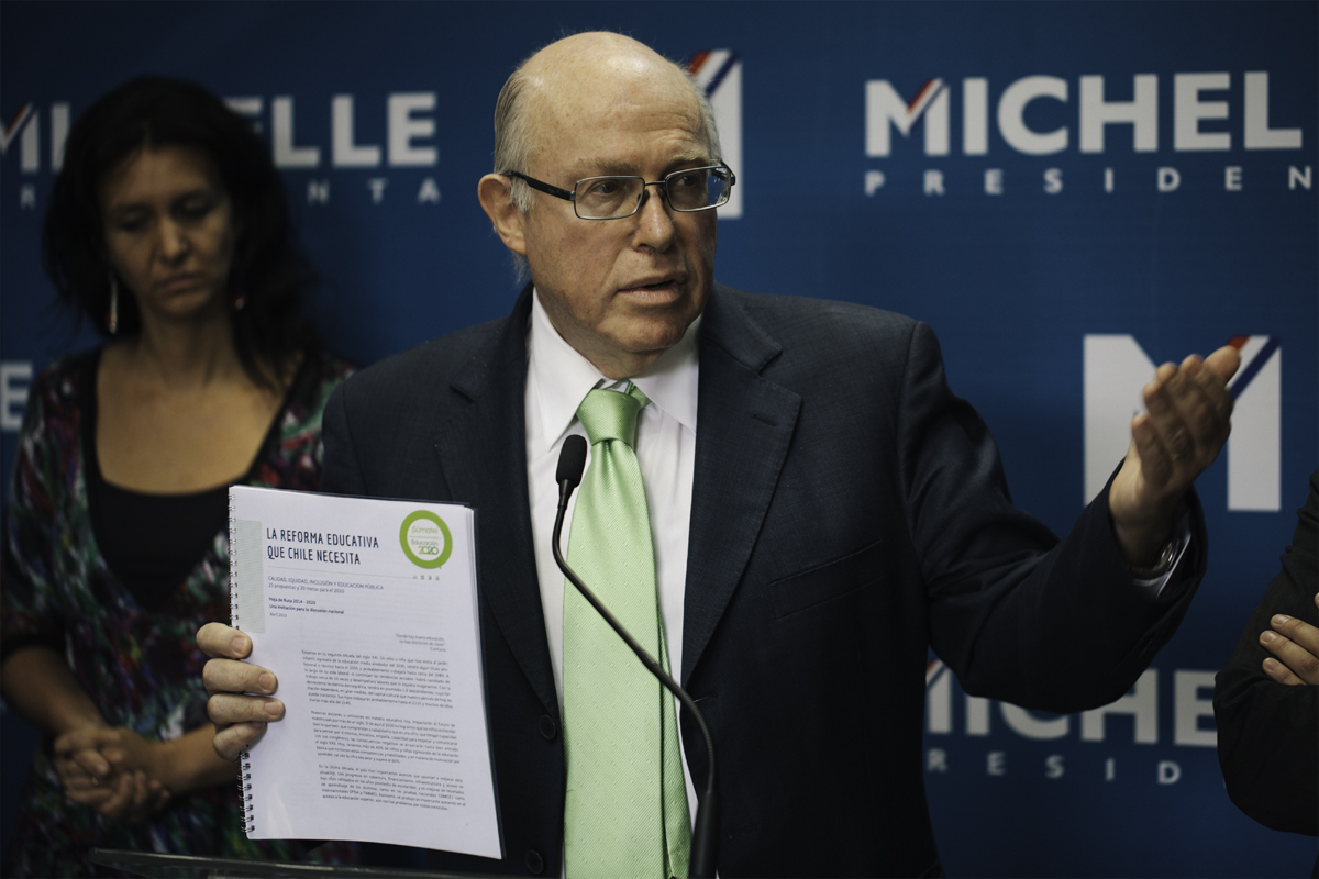 Mario Waissbluth, académico chileno.